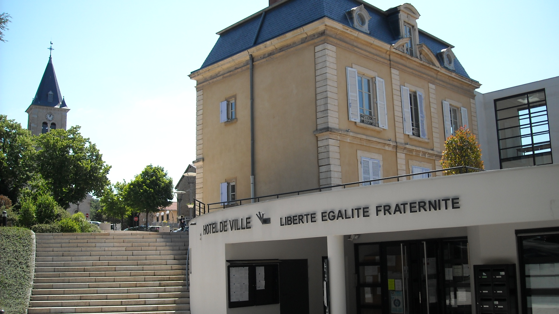 centre ville